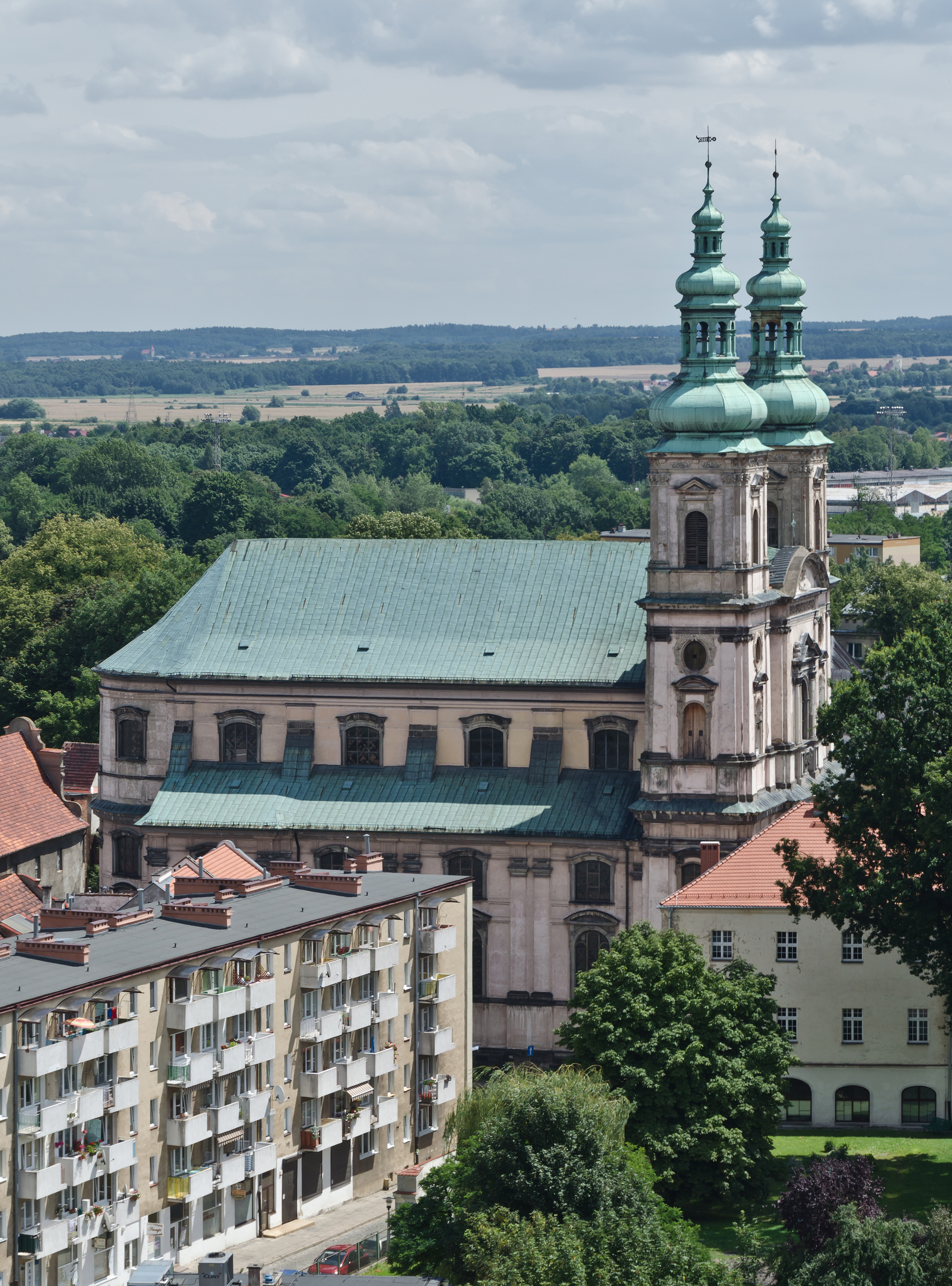 Nysa, kościół, ob. fil. p.w. Wniebowzięcia NMP, 1689-1692, 1820, 1907